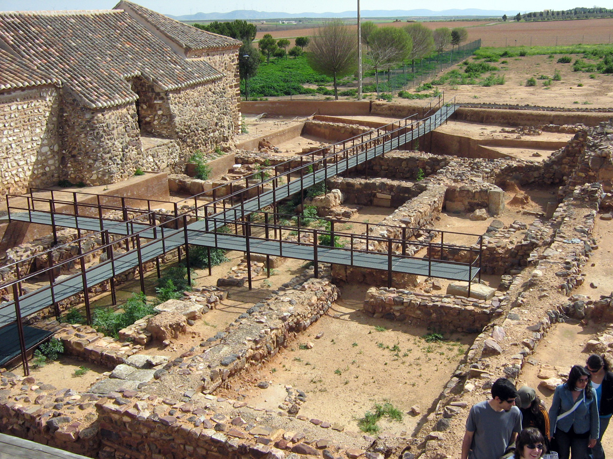 Fotografía del yacimiento de Oreto-Zuqueca, en Ciudad Real (España). La foto tiene una buena perspectiva, ya que se realizó desde una plataforma elevada que se encuentra en la parte central del sitio.